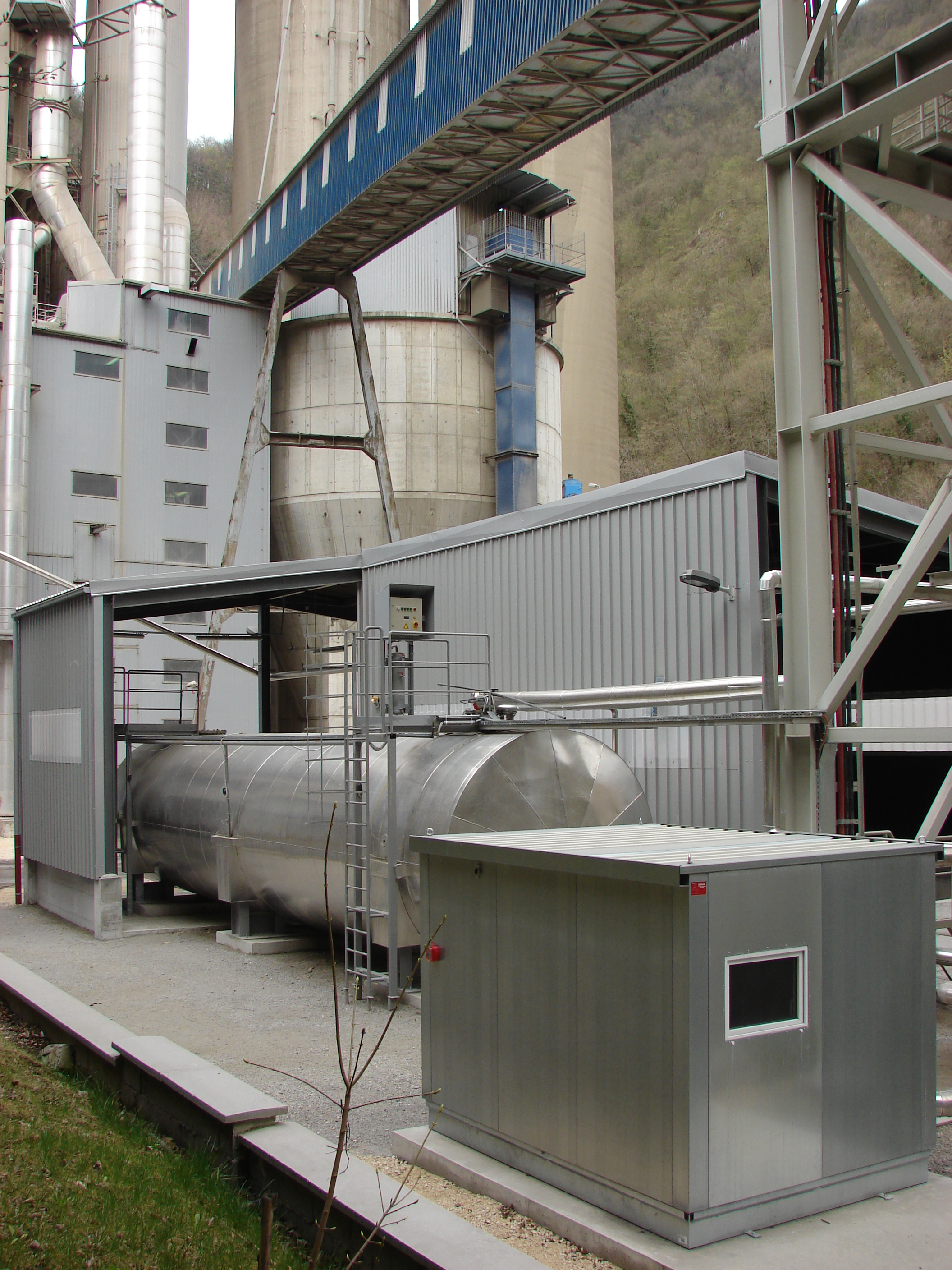 Na sedmi točki so predstavljene okoljske zaveze cementarne